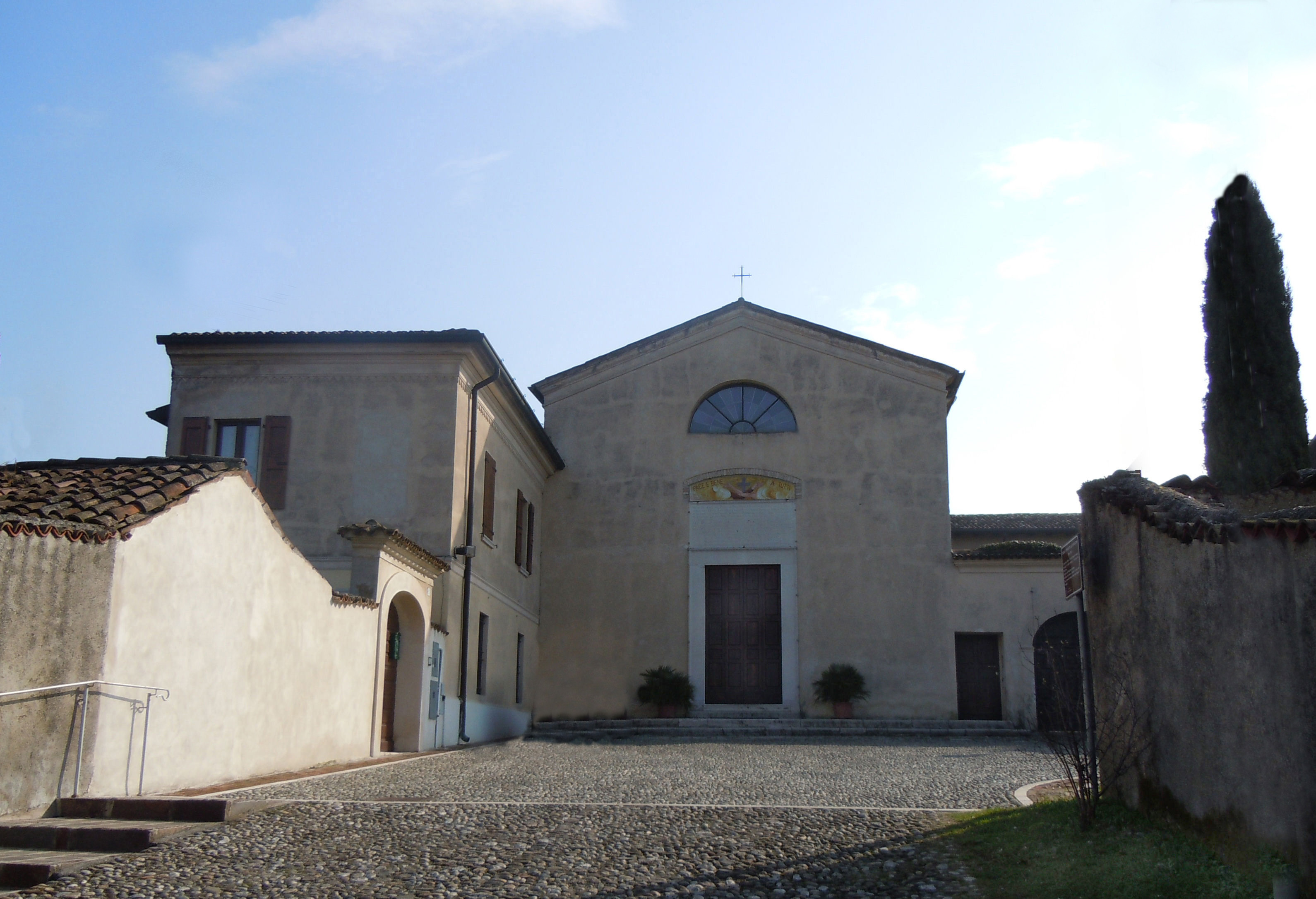 Castiglione delle Stiviere, chiesa di San Francesco d'Assisi, già del Convento dei Cappuccini.